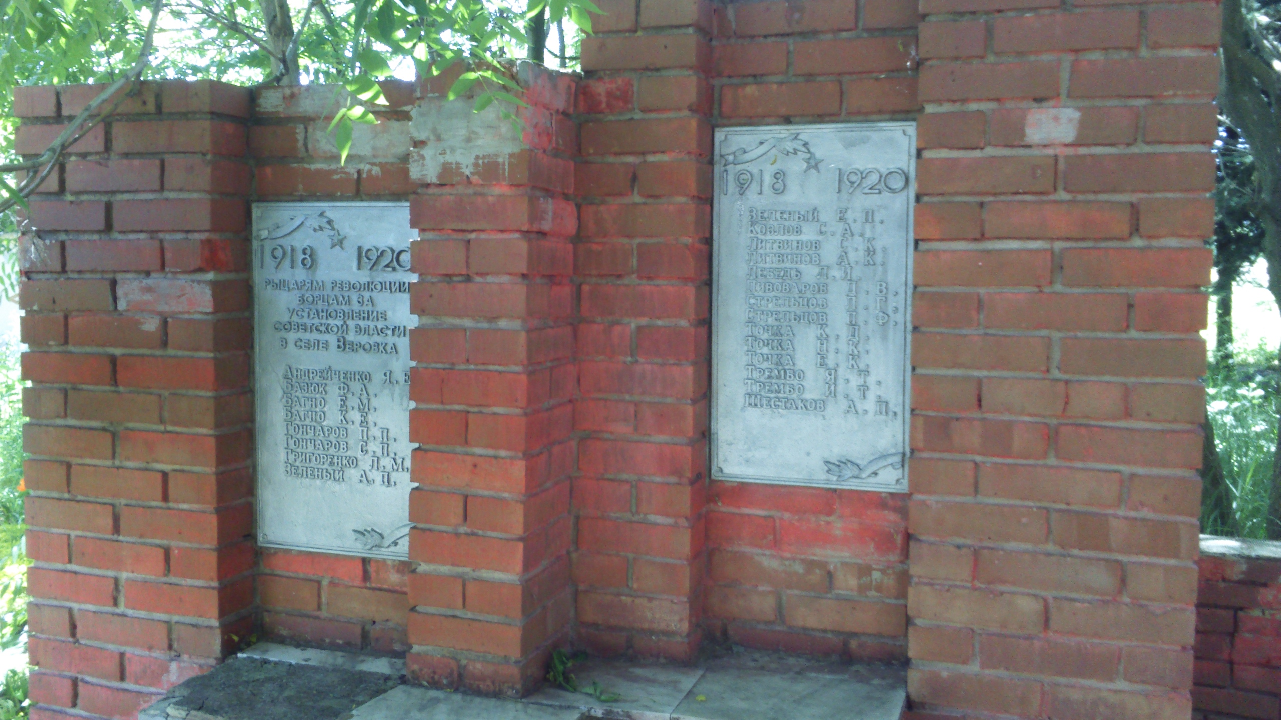 Ві́рівка — село в Україні, Добропільському районі Донецької області.